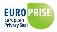 EuroPriSe Logo